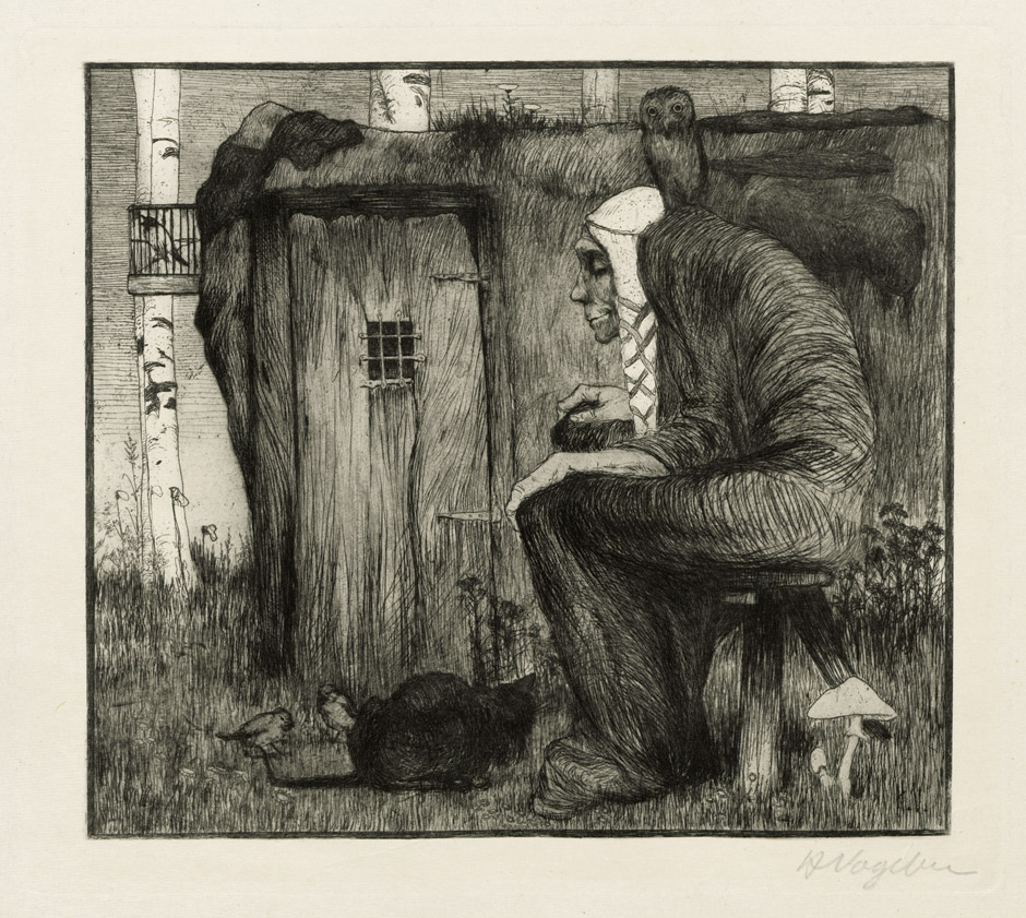 Die Hexe mit Eule. Radierung 22,9 x 25,8 cm Platte